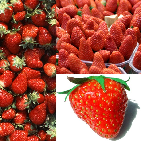 Fraises pour Wikibooks.